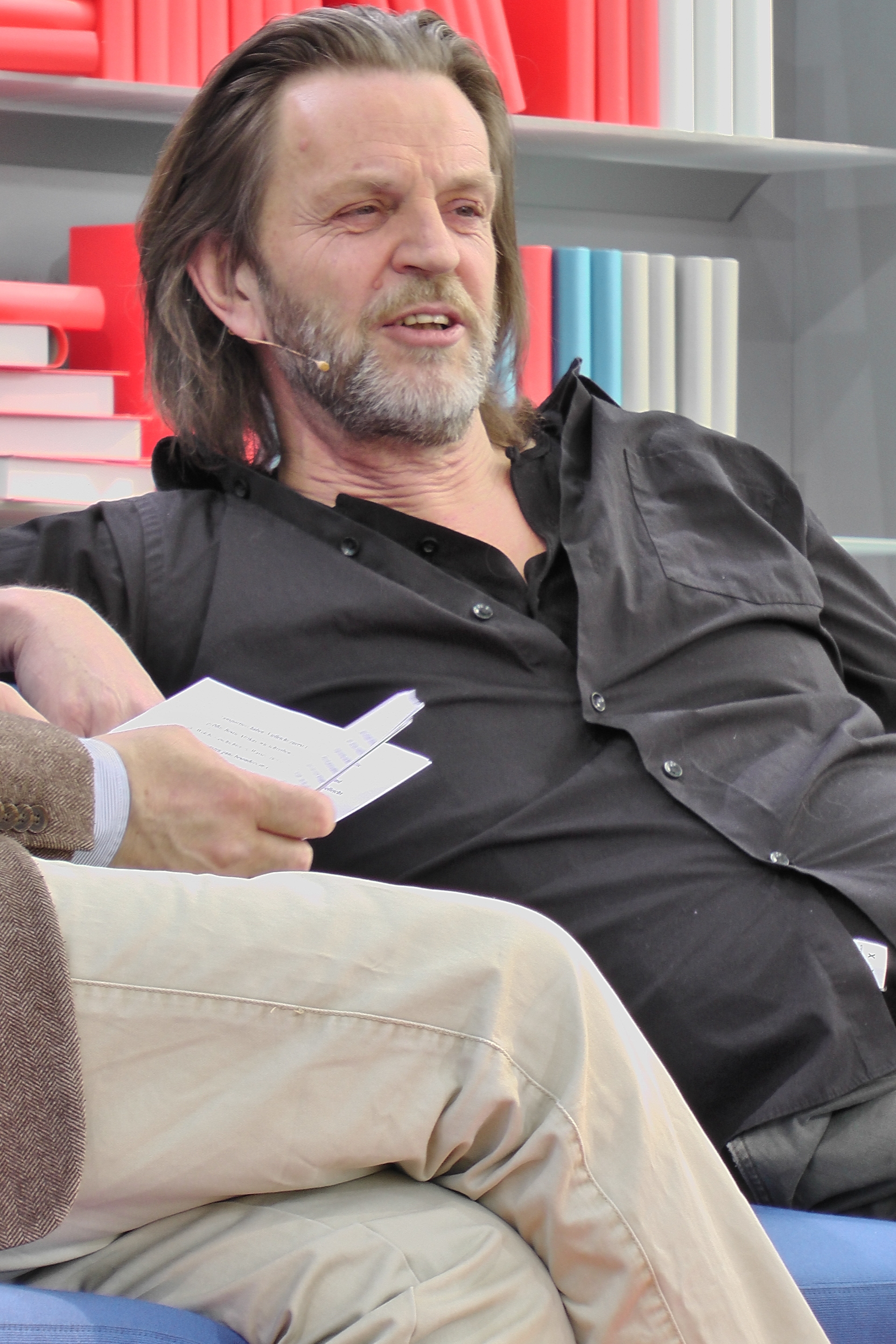 Helge Timmerberg